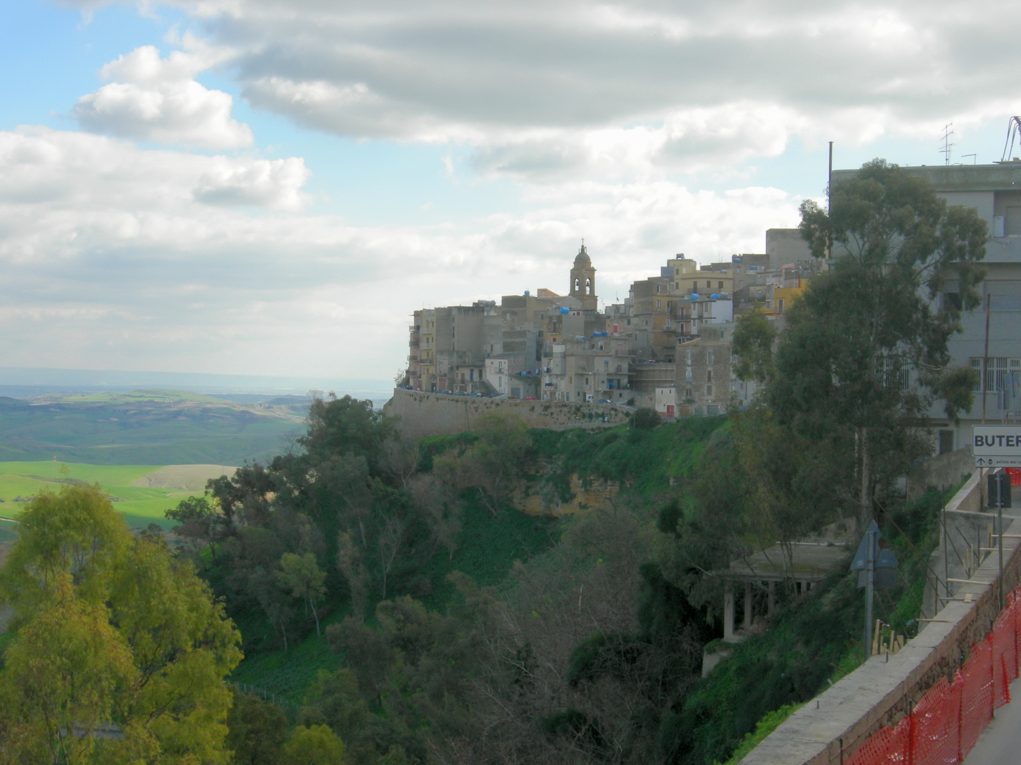 Veduta di Butera (province of Caltanissetta)